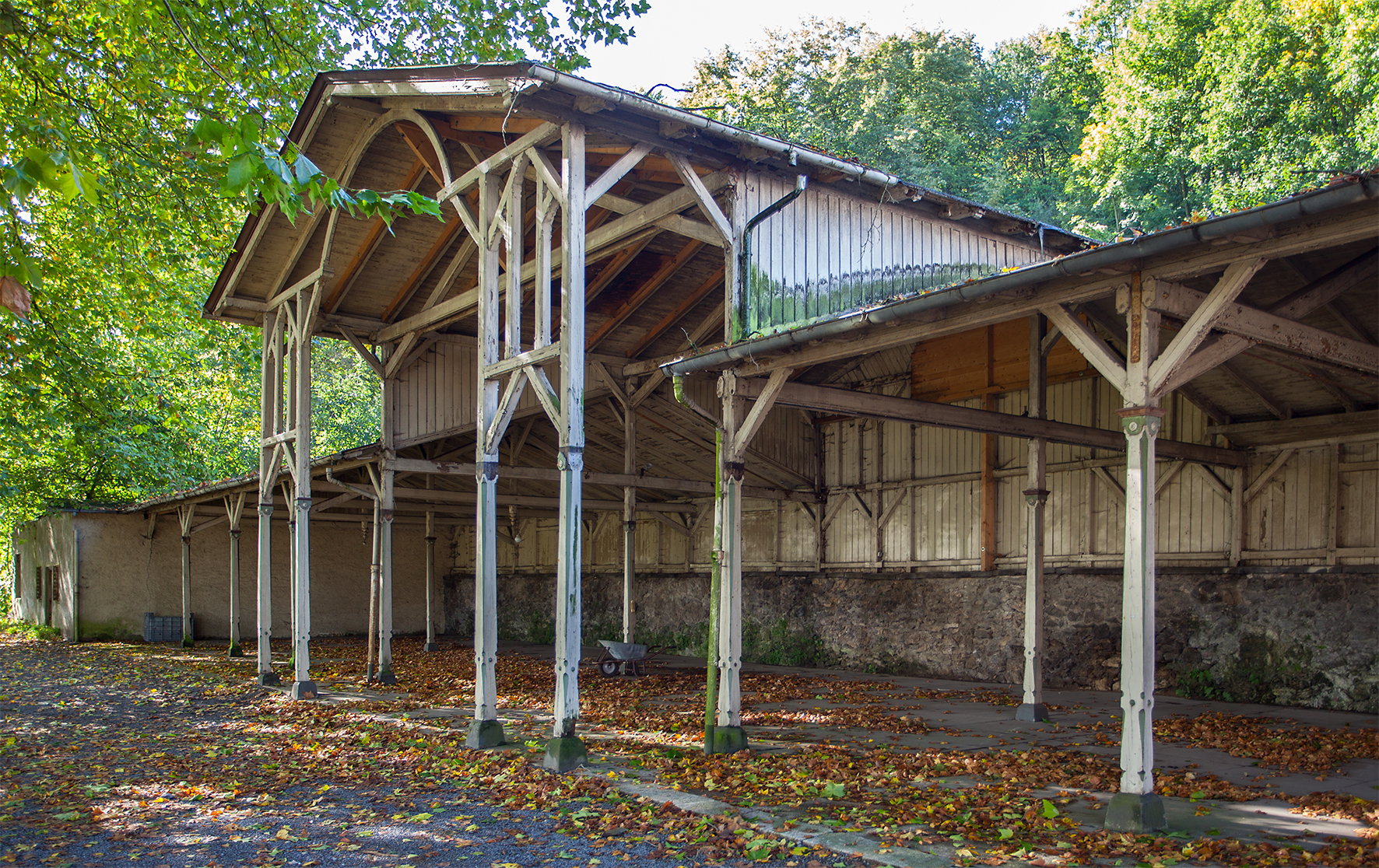 Laubenhalle des Hotels Kaiserhof in Porta Westfalica This is a photograph of an architectural monument.